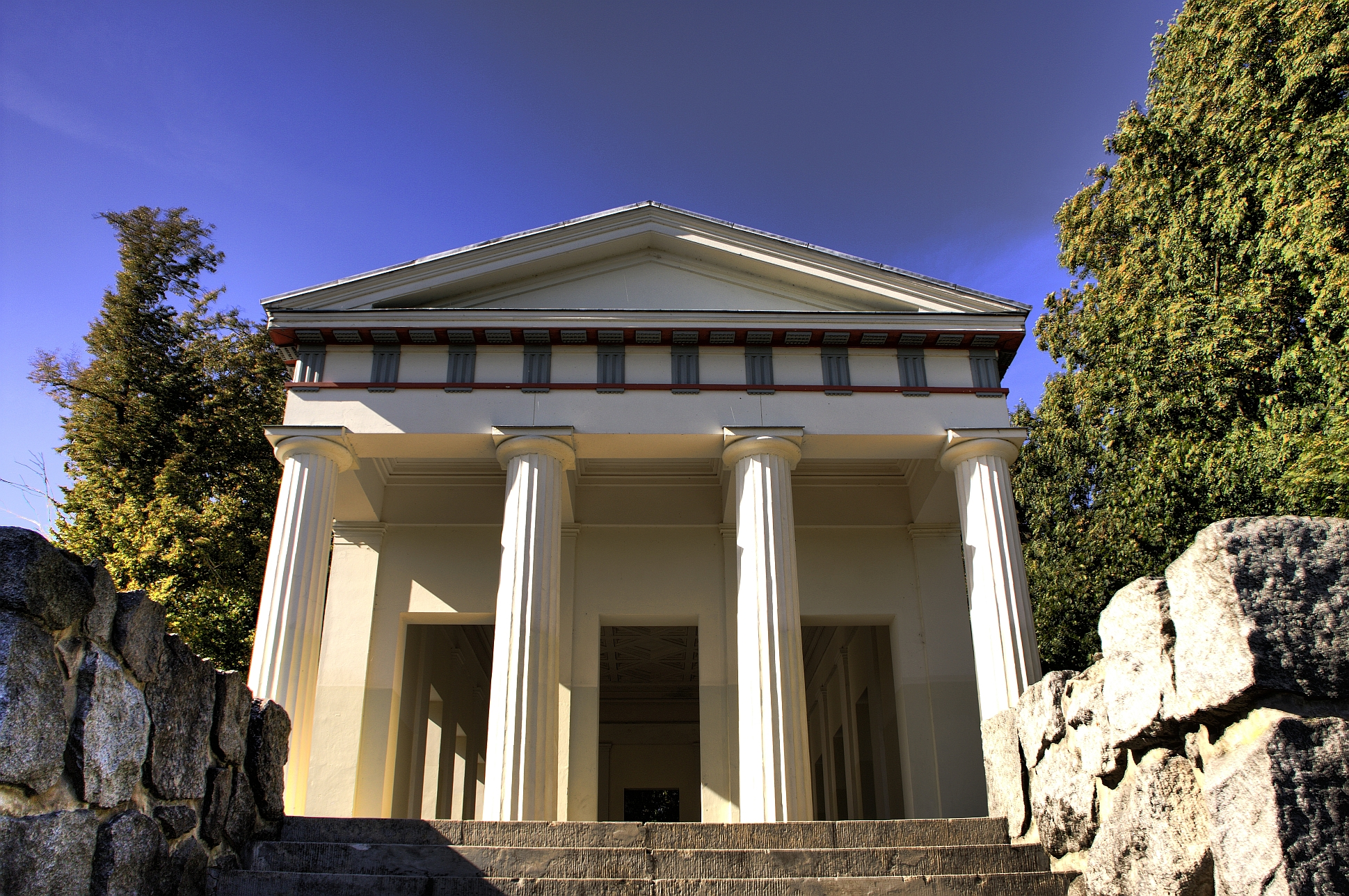 Blick von den Treppenstufen des Belvedere durch das Objekt 'hindurch'.